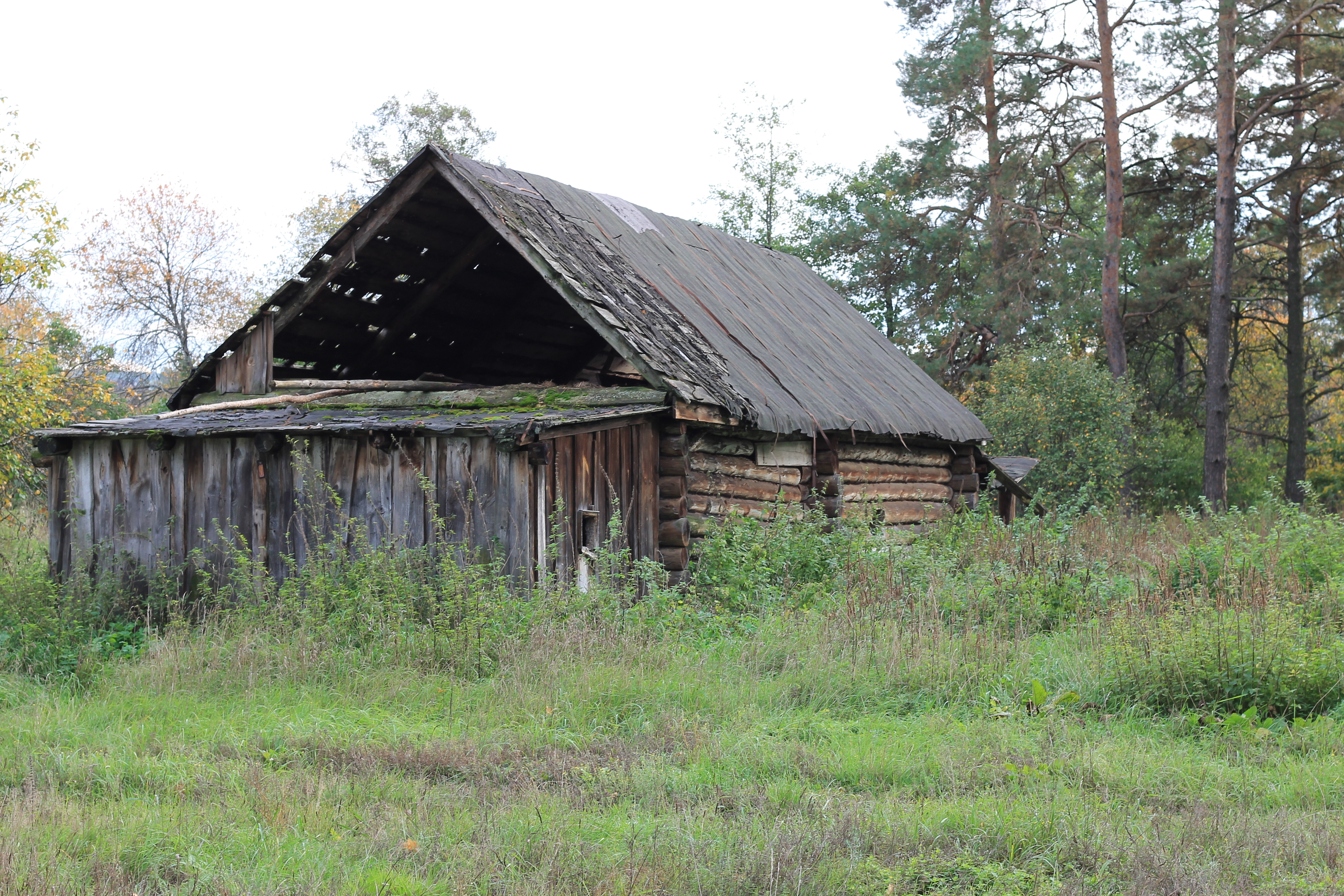 Ichalkovsky District, Mordovia, Russia